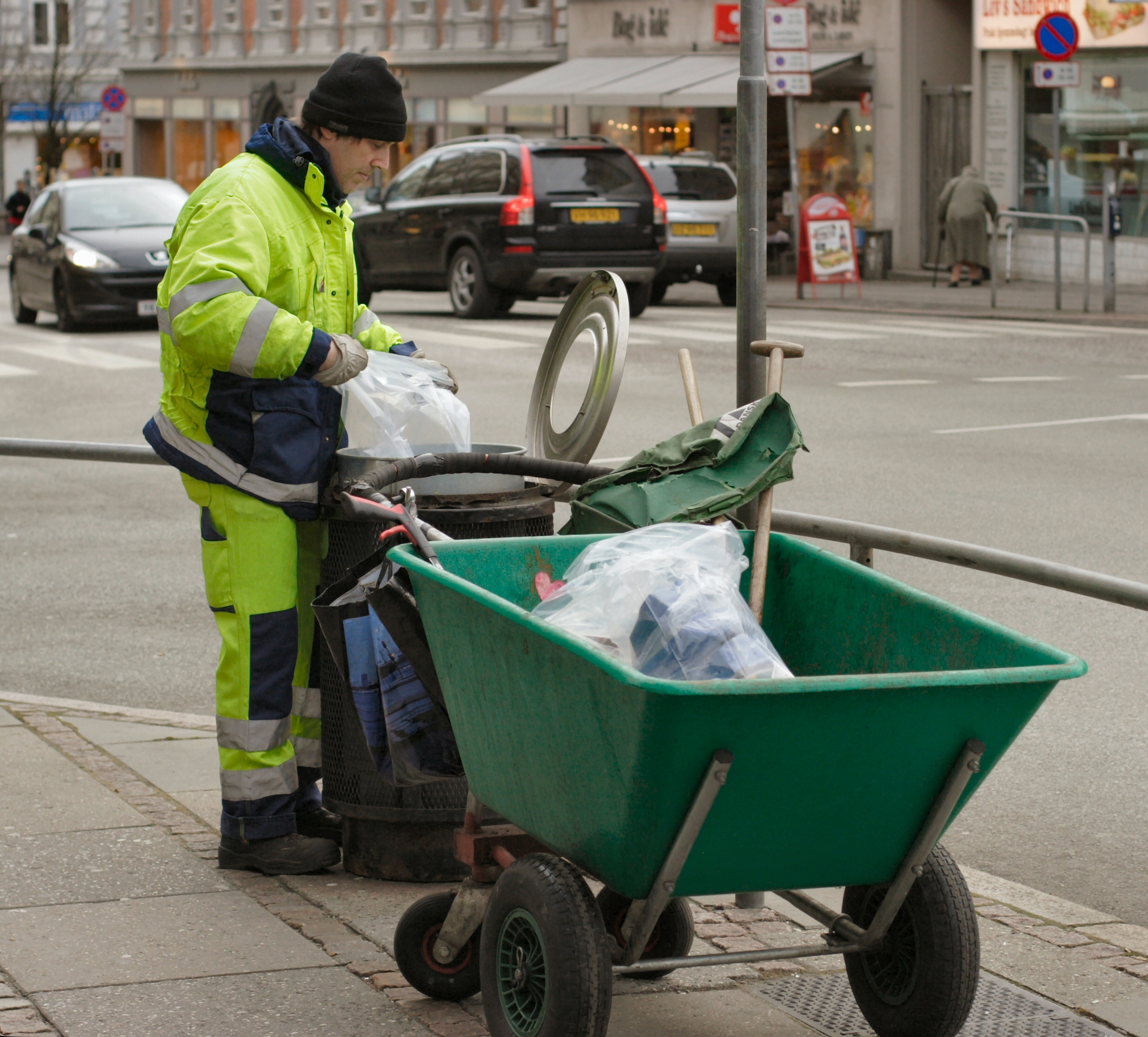 Gadefejer på Rådhuspladsen i Århus